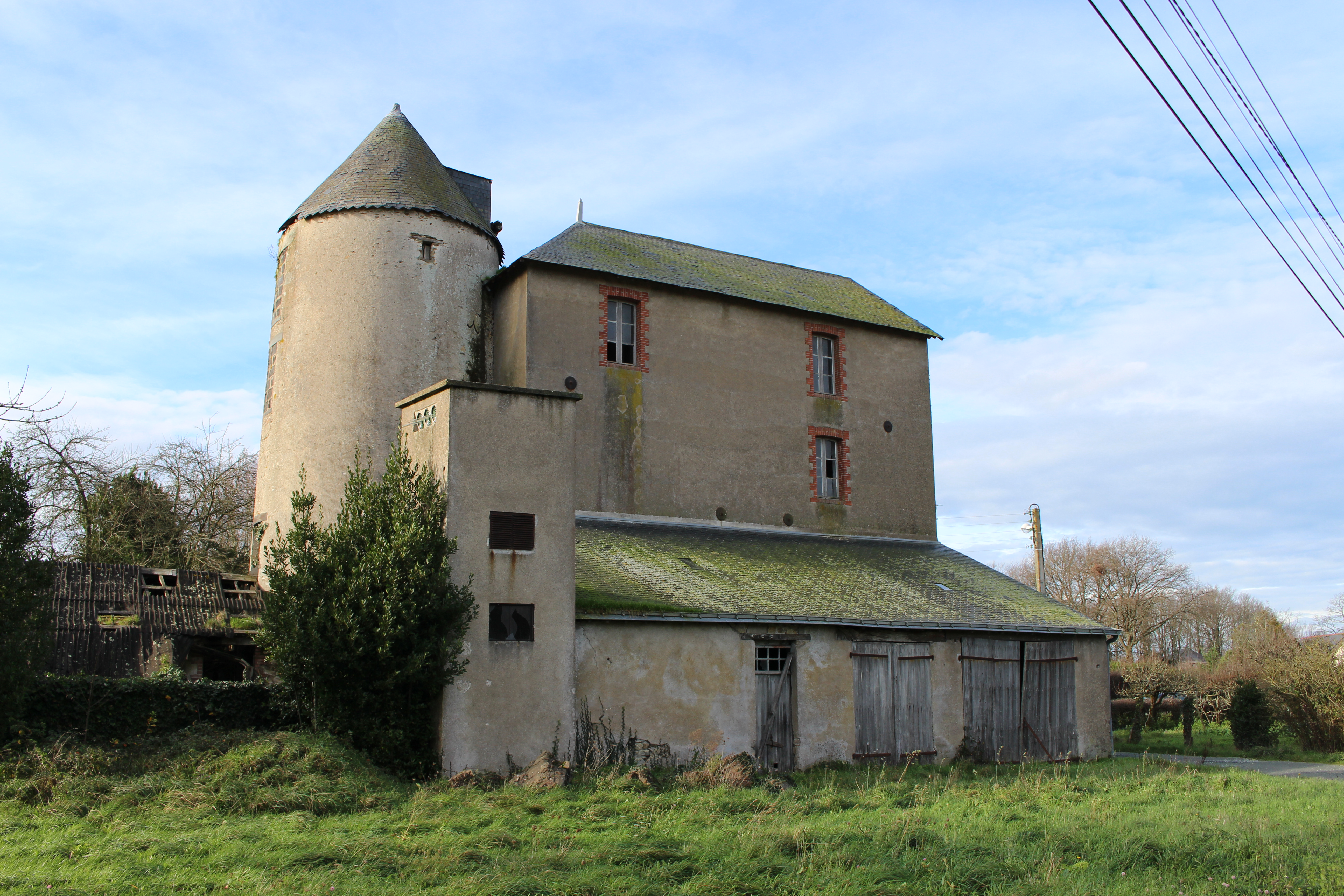 Notre-Dame-des-Landes, Loire-Atlantique